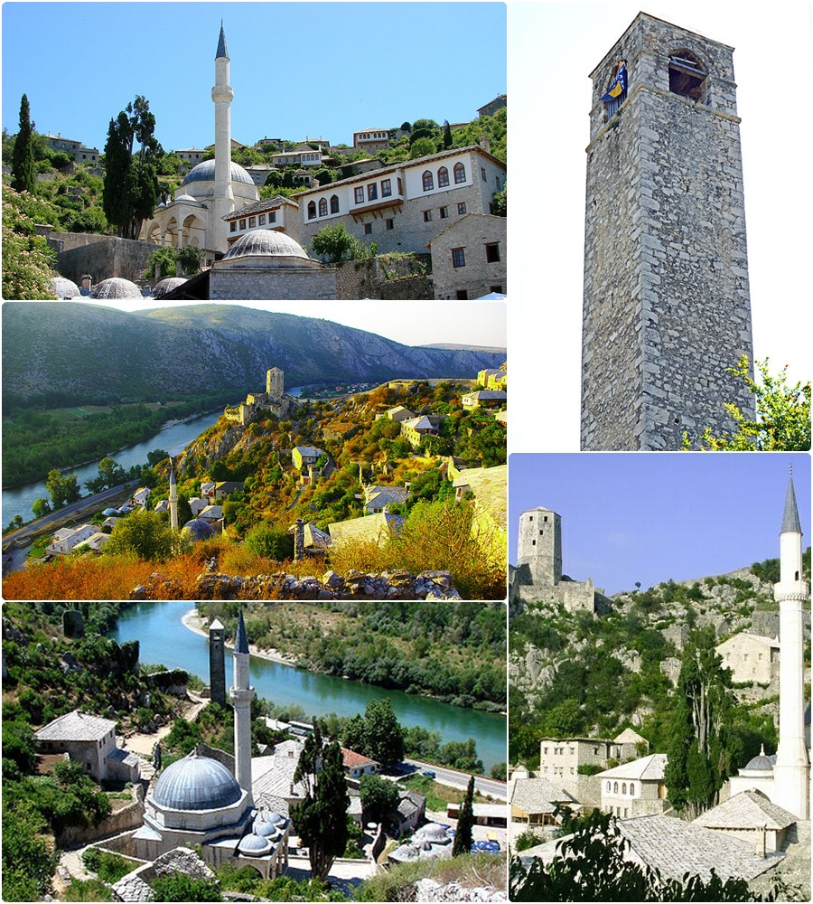 Počitelj